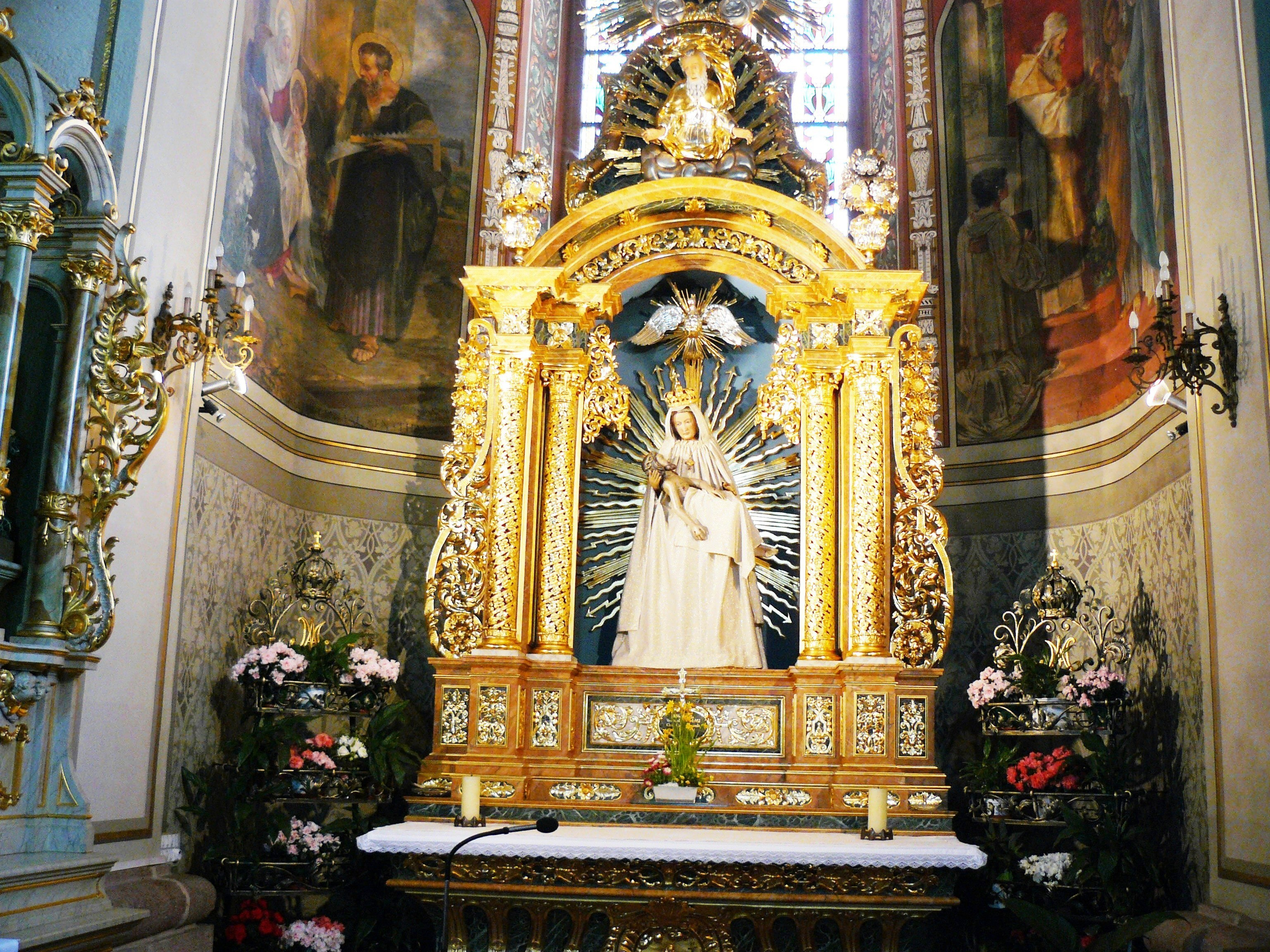 Chapelle avec son autel (1727) et la statue miraculeuse de la Vierge couronnée au Prieuré de Thierenbach (Haut-Rhin).